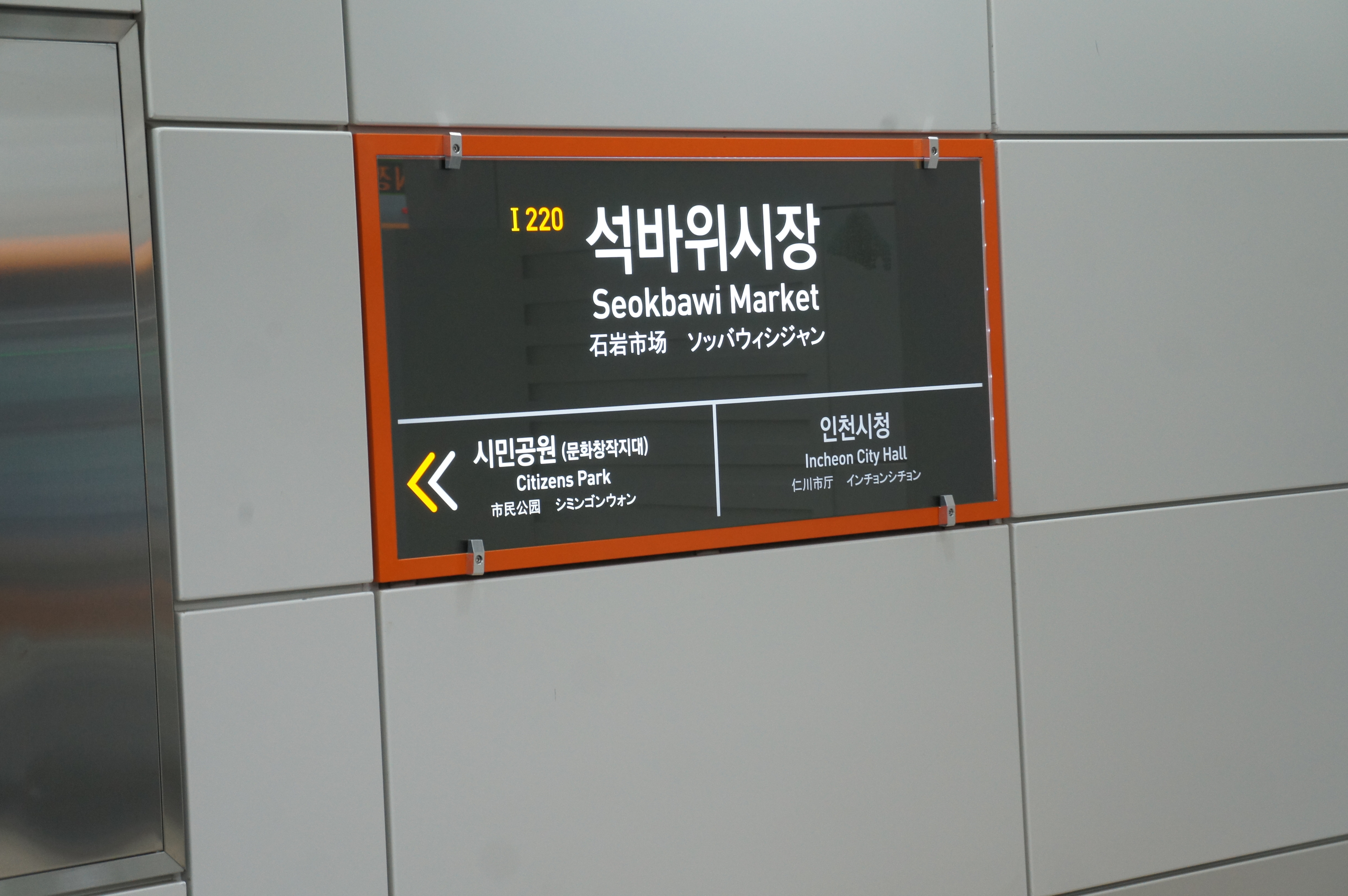 석바위시장역 역명판